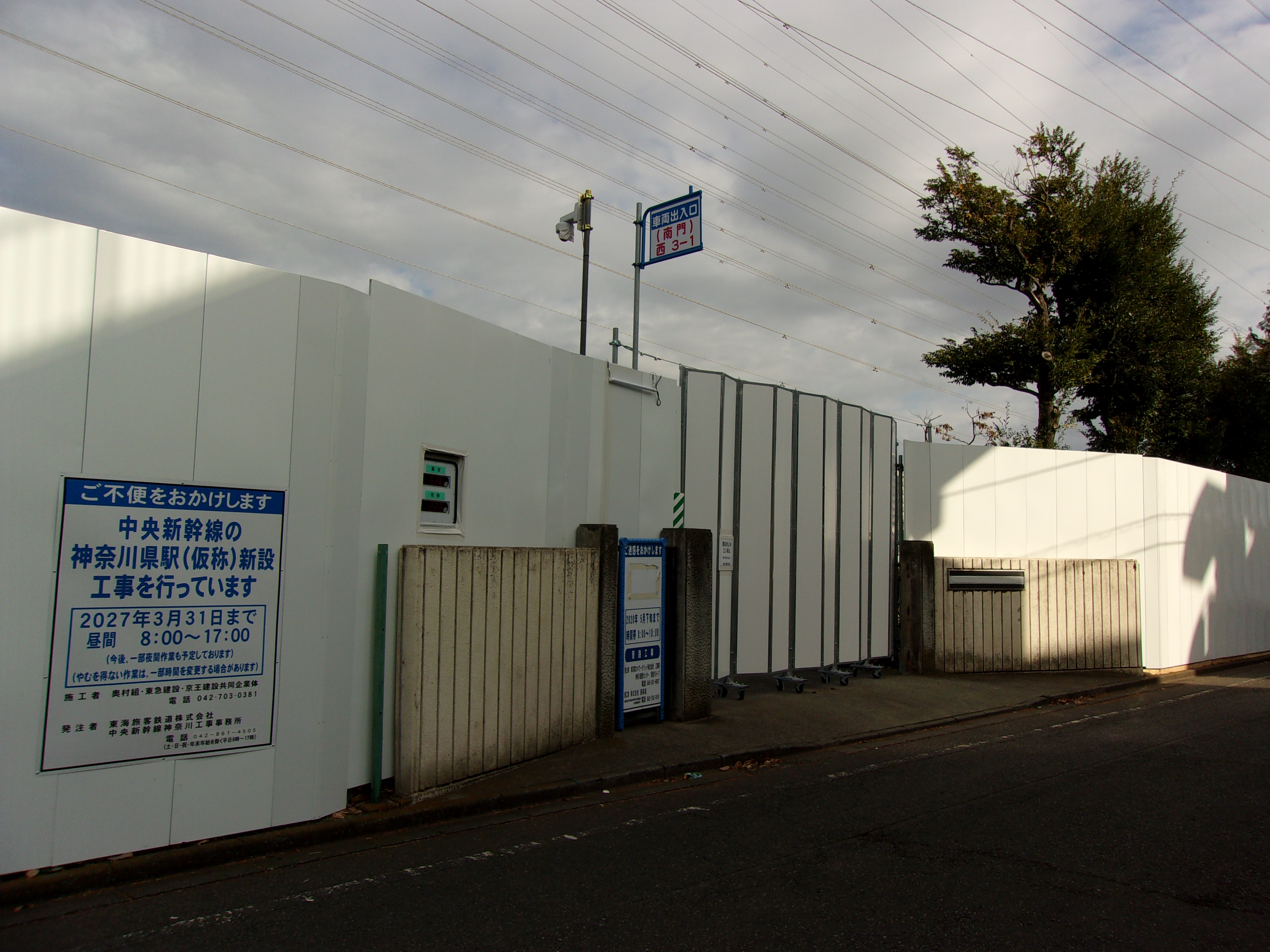 リニア中央新幹線神奈川県駅建設予定地のJR東海取得管理用地（旧神奈川県立相原高校敷地）